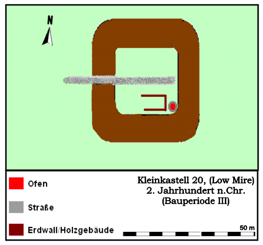 Befundskizze des Kleinkastell 20 (Low Mire), Küstenschutz Cumbria/Hadrianswall.